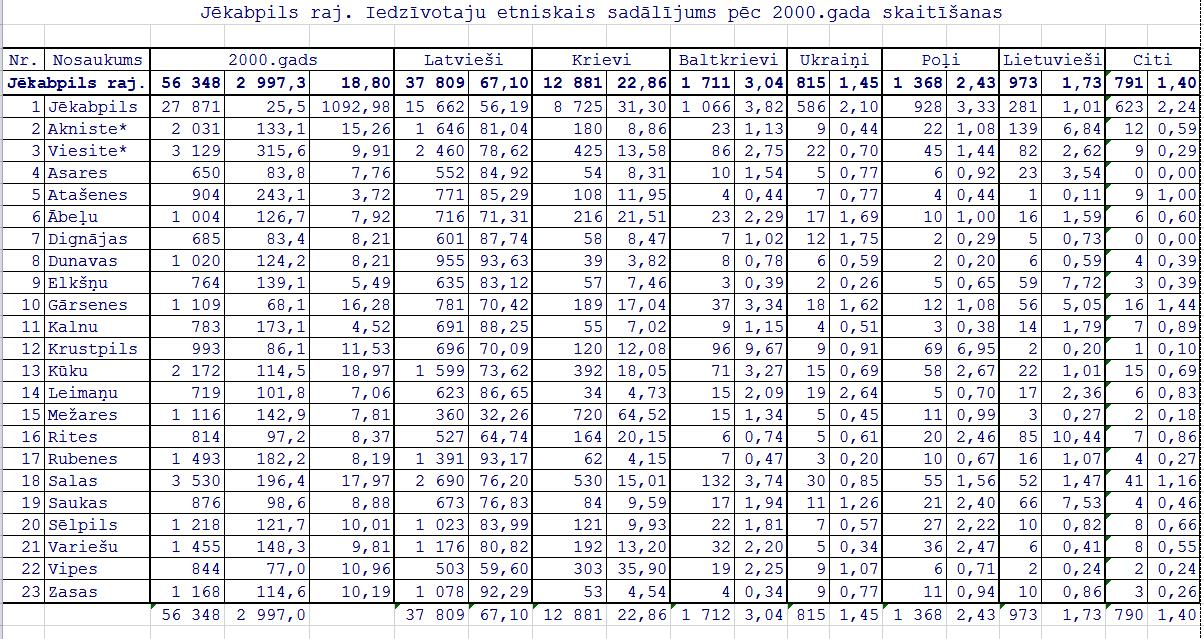 результаты переписи населения Латвии ни 01.04.2000